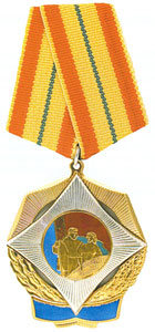 Ордэн Пашаны